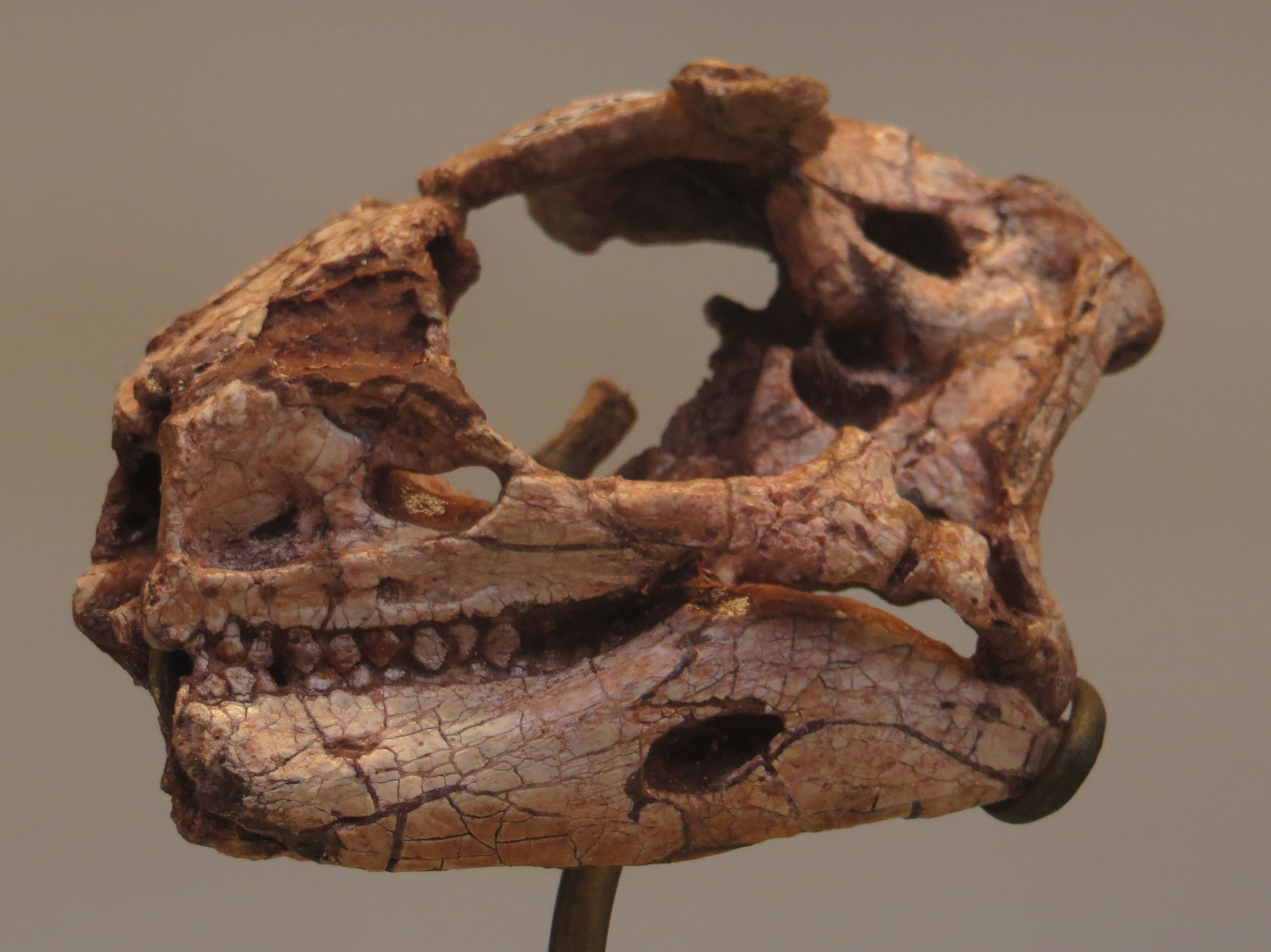 Skull of Lesothosaurus - ornithischian dinosaur